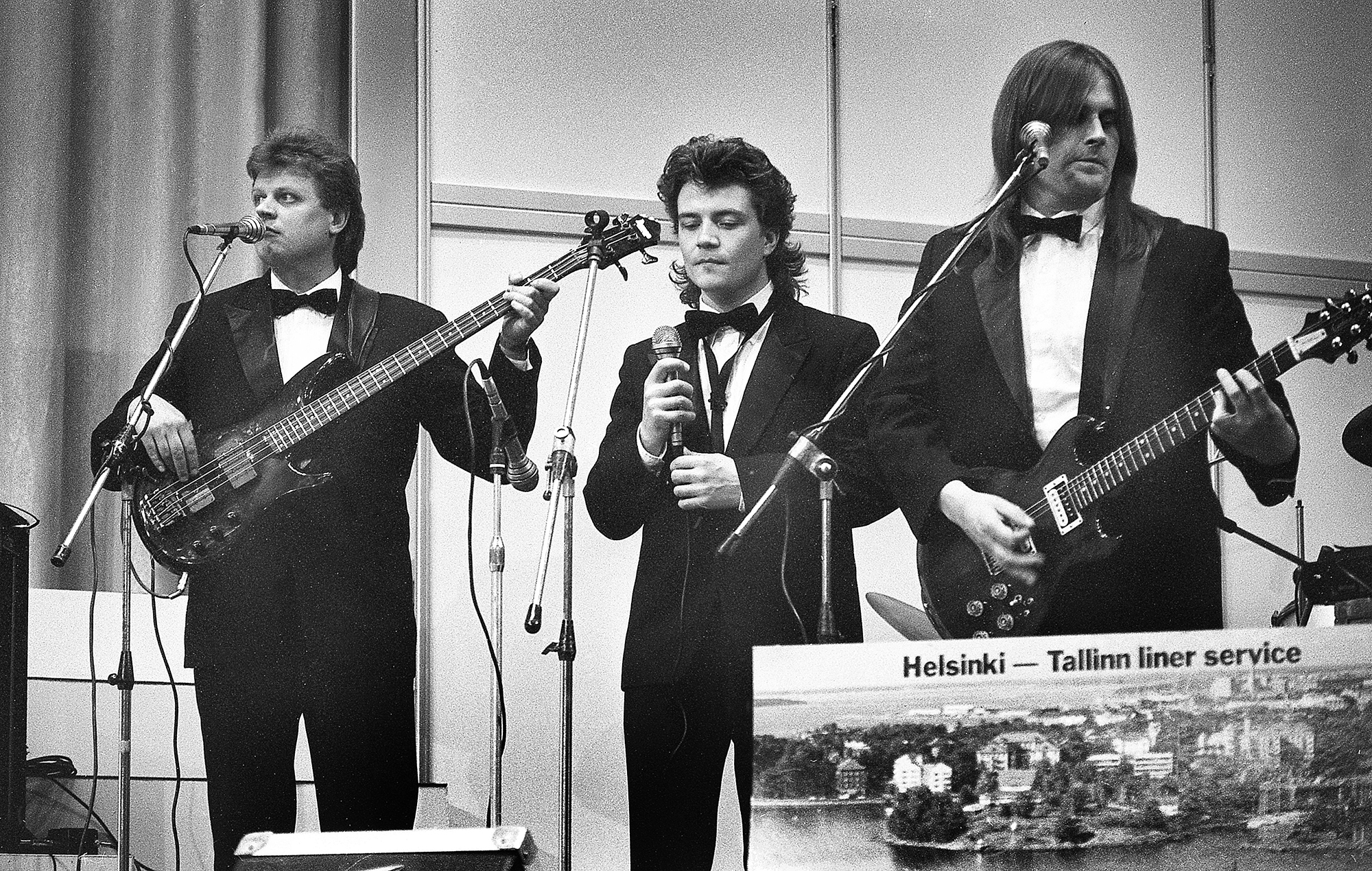 Meelis Punder, Karl Madis ja Agu Tammeorg, Karavan 1989